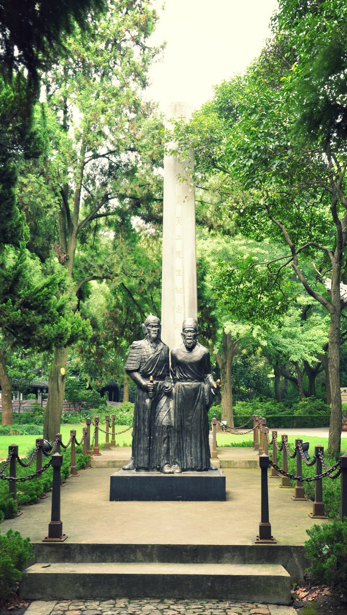 明忠节侯黄二先生纪念碑 嘉定南大街汇龙潭公园内